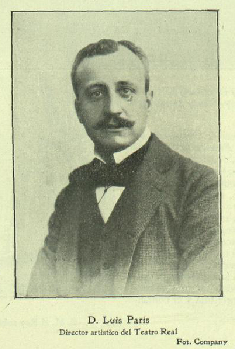 Luis París, director artístico del Teatro Real.